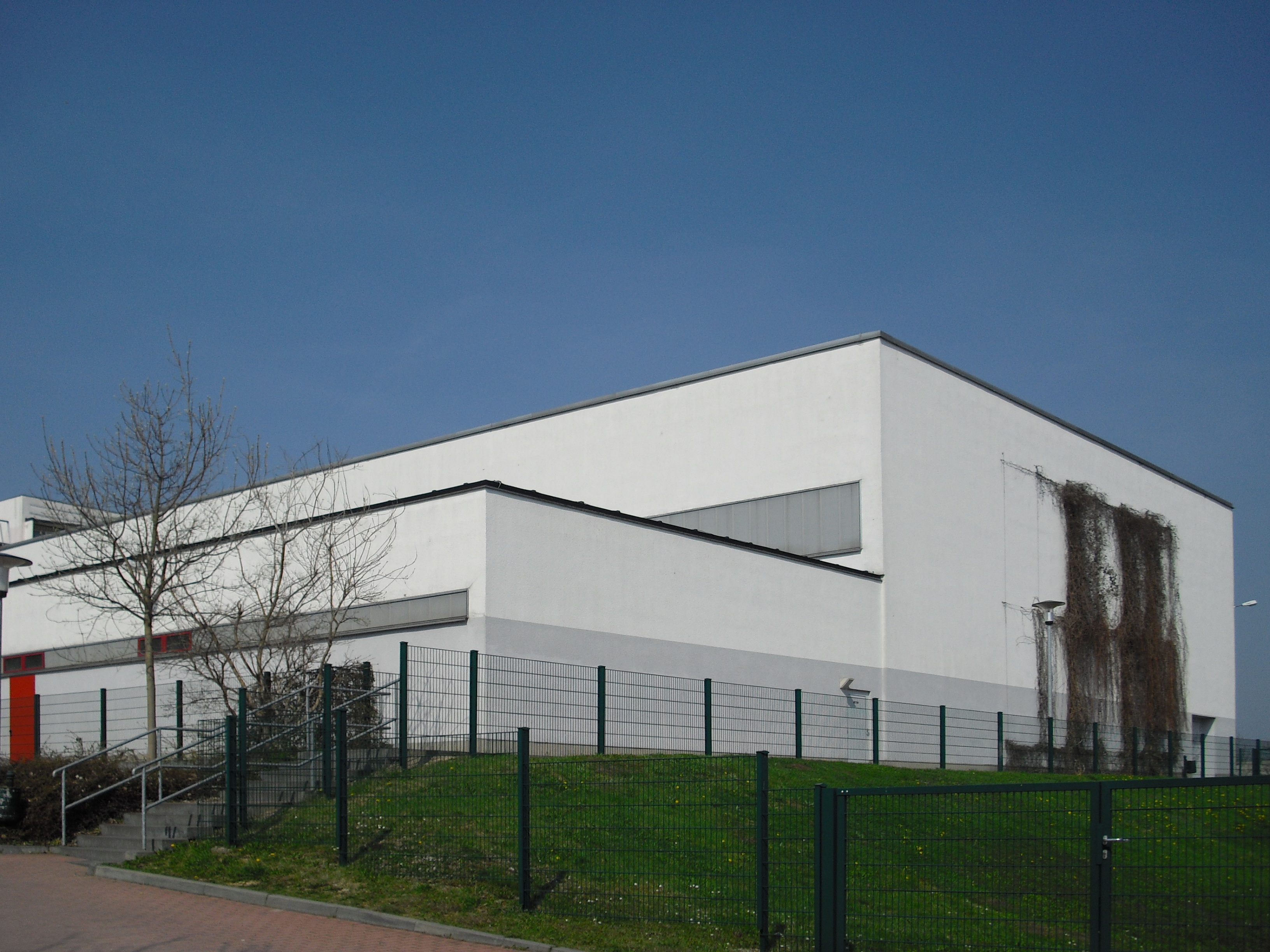 Werner-Seelenbinder-Turnhalle